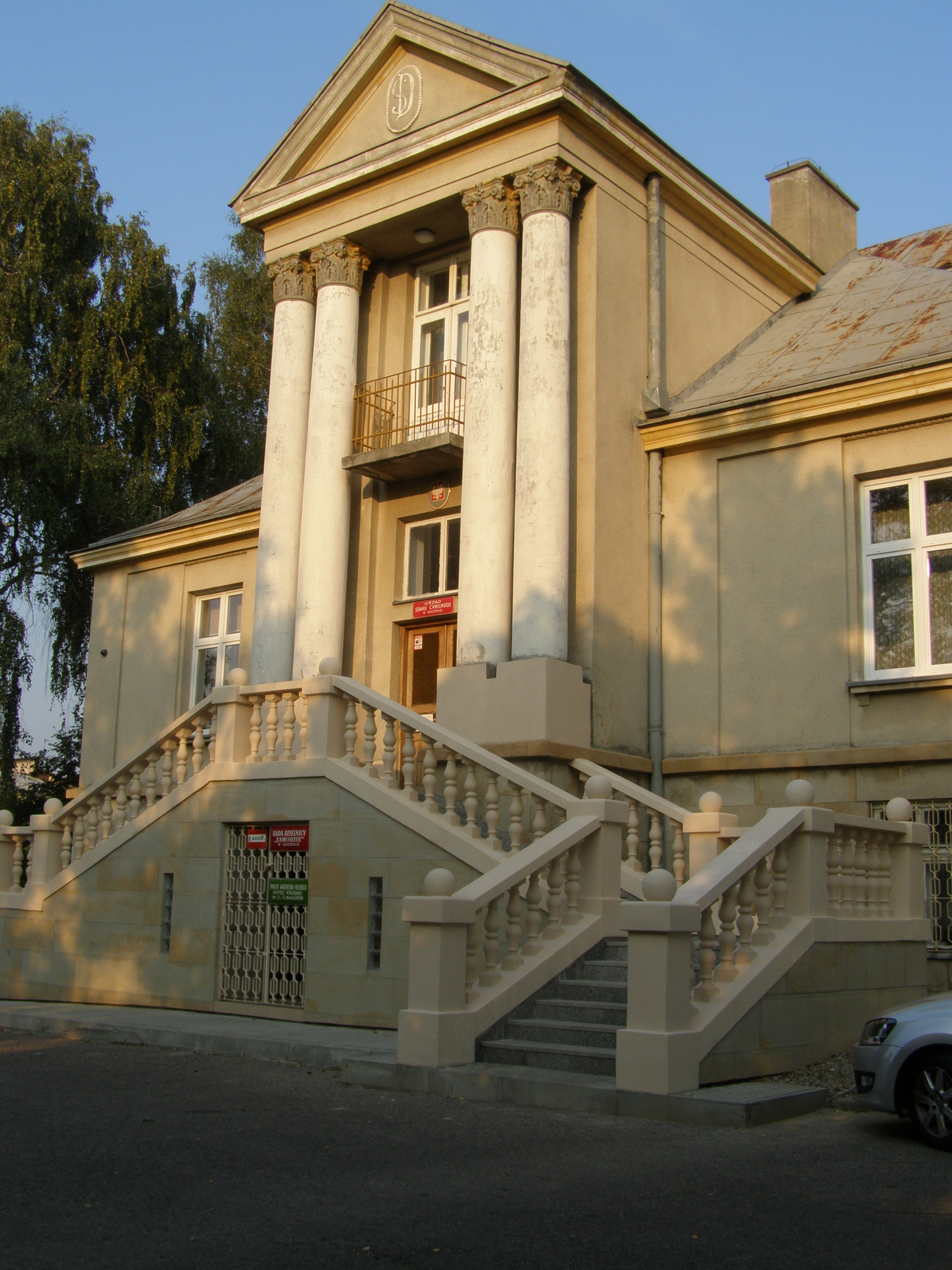 Krosno - Pałac Dunikowskiego (obecnie USC), ul. 8 Września 4. 11.1989.